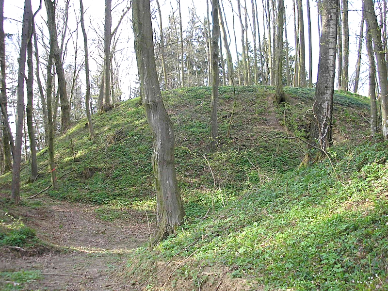 Hochmittelalterlicher Burgstall (Turmhügelburg) Bachern (Stadt Friedberg, Landkreis Aichach-Friedberg, Bayerisch-Schwaben). Der Turmhügel von Süden. Eigene Aufnahme, April 2008 / High Middle Ages motte-and-bailey castle Bachern near Friedberg (Bavaria, Germany). The motte from the south. Own photo, April 2008